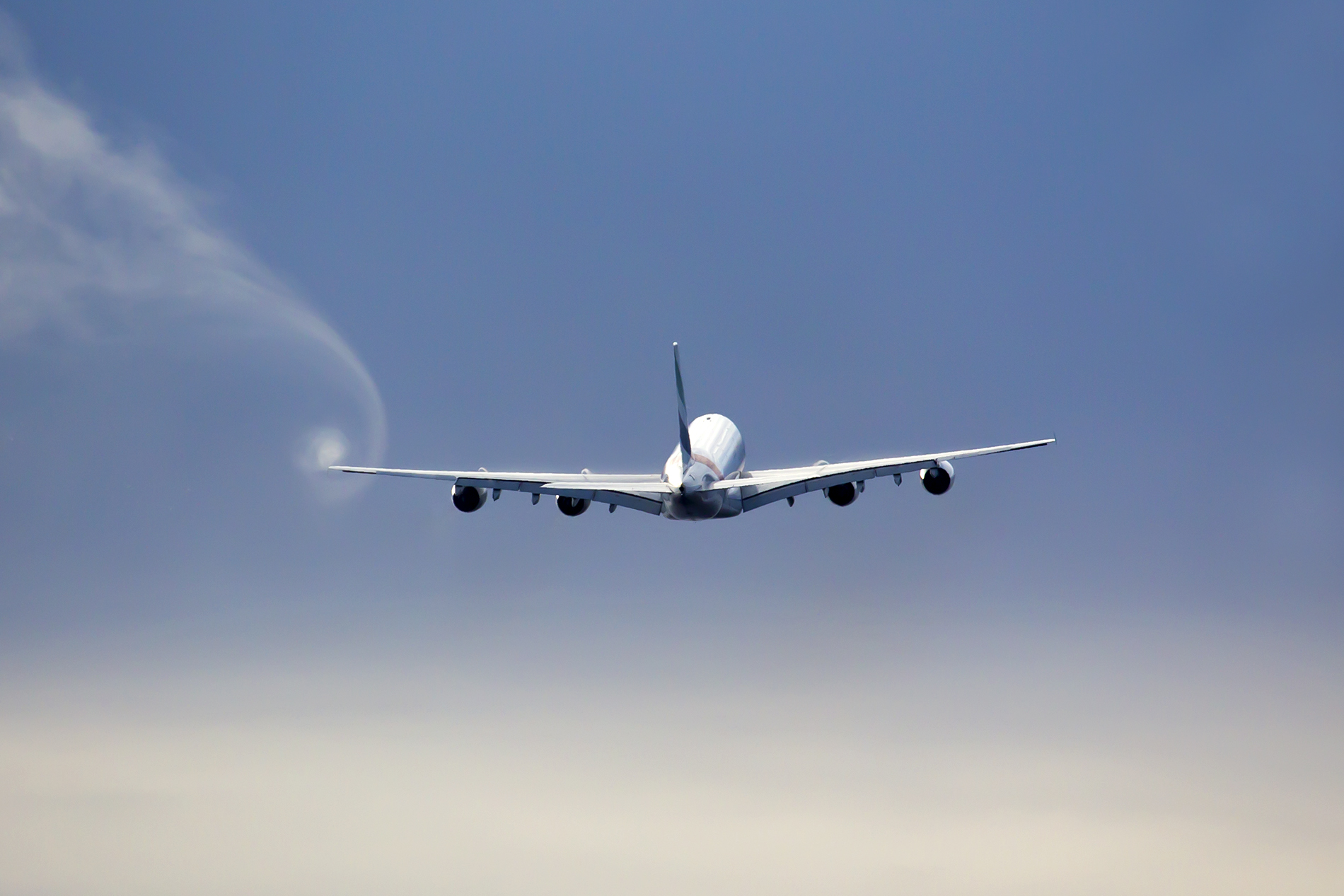 A6-ADT A380 Emirates